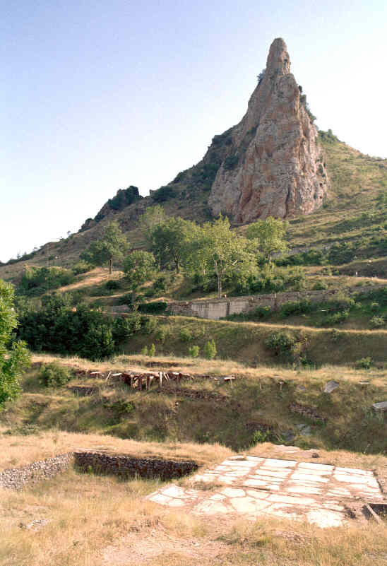 Salinas en Poza de la Sal (Burgos), (España), donde se distinguen las eras donde se evaporaba el agua salada y las balsas donde se almacenaba. Tomada por JMSE el 4 de julio de 2003 y cedida a Wikipedia